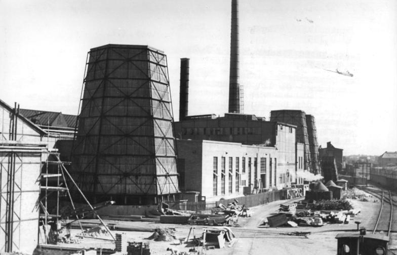 Magdeburg, SAG Schwermaschinenbau, Werksgelände Zentralbild Biscan 16.9.1953 1003.A.V. Der Schwermaschinenbau "Karl Liebknecht" in Magdeburg -ab 1.1.54 deutsches Eigentum Zu den 33 SAG-Betrieben, die entsprechend dem sowjetisch-deutschen Abkommen in deutsche Hand übergeben werden, gehört die SAG Schwermaschinenbau "Karl Liebknecht" in Magdeburg, das frühere Buckau-Wolf Werk. Das Liebknecht-Werk hat zwei grosse auf das beste eingerichtete Betriebsstätten, ein Werk in Magdeburg-Buckau, eins in Magdeburg-Salbke. Die Erzeugnisse des Liebknecht-Werkes gehen in alle Welt und erfreuen sich überall des besten Rufes, besonders die Dieselmotoren, die Berger, die Schreitbagger und die Kesselanlagen. UBz: Teilansicht der Anlage des Werkes SALBKE.